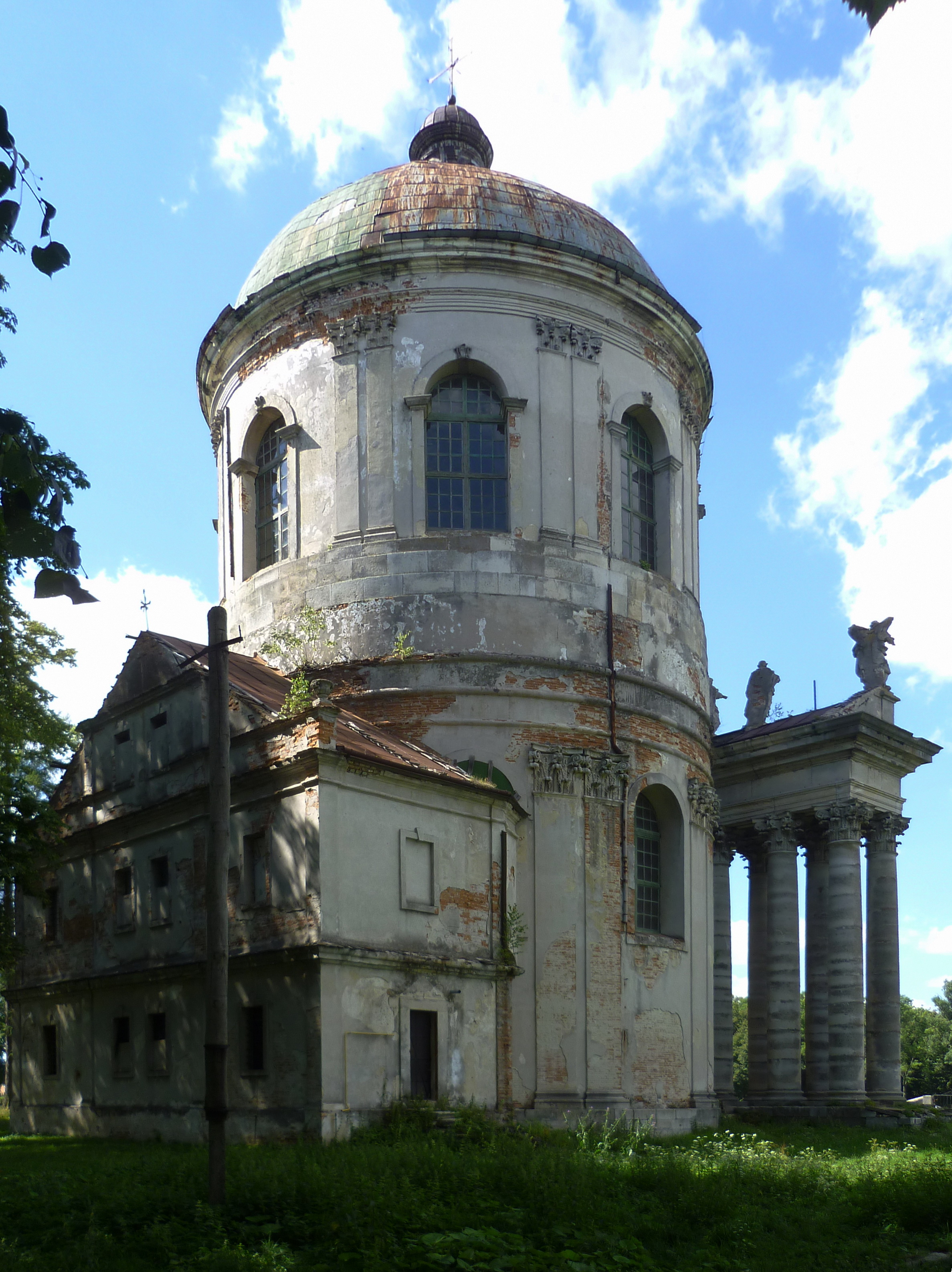 Костел Св. Йосифа (1763 р.) - вигляд позаду - с.Підгірці Бродівський район Львівська область Україна